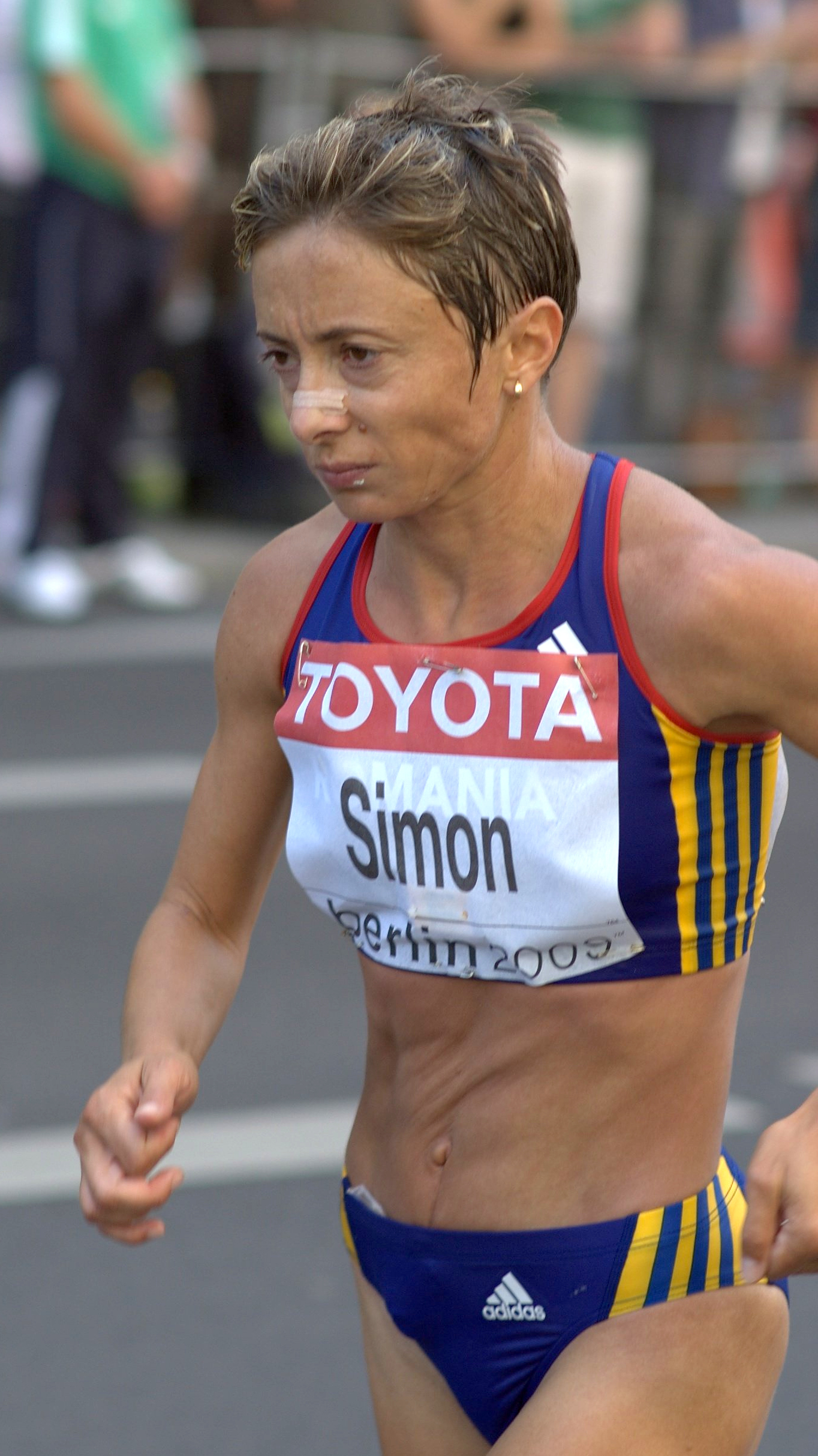 Leichtathletik Weltmeisterschaft Berlin 2009, Frauen-Marathon. Lidia Simon.